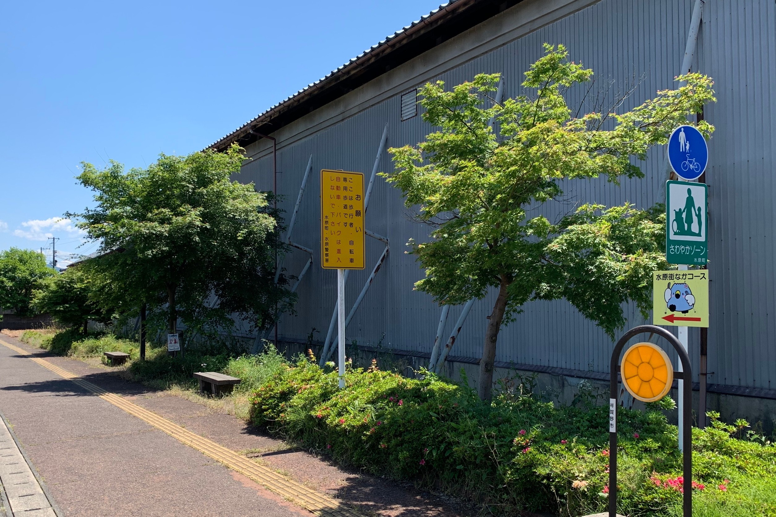 水原駅からあがの市民病院、阿賀野高校を経て水原総合体育館に至る歩行者自転車道（阿賀野市，2020年5月）一部沿線住宅の車乗り入れあり。